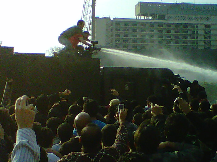 IMG00101-20110125-1537